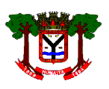 Bandeira do município de Humaitá, Amazonas, Brasil.